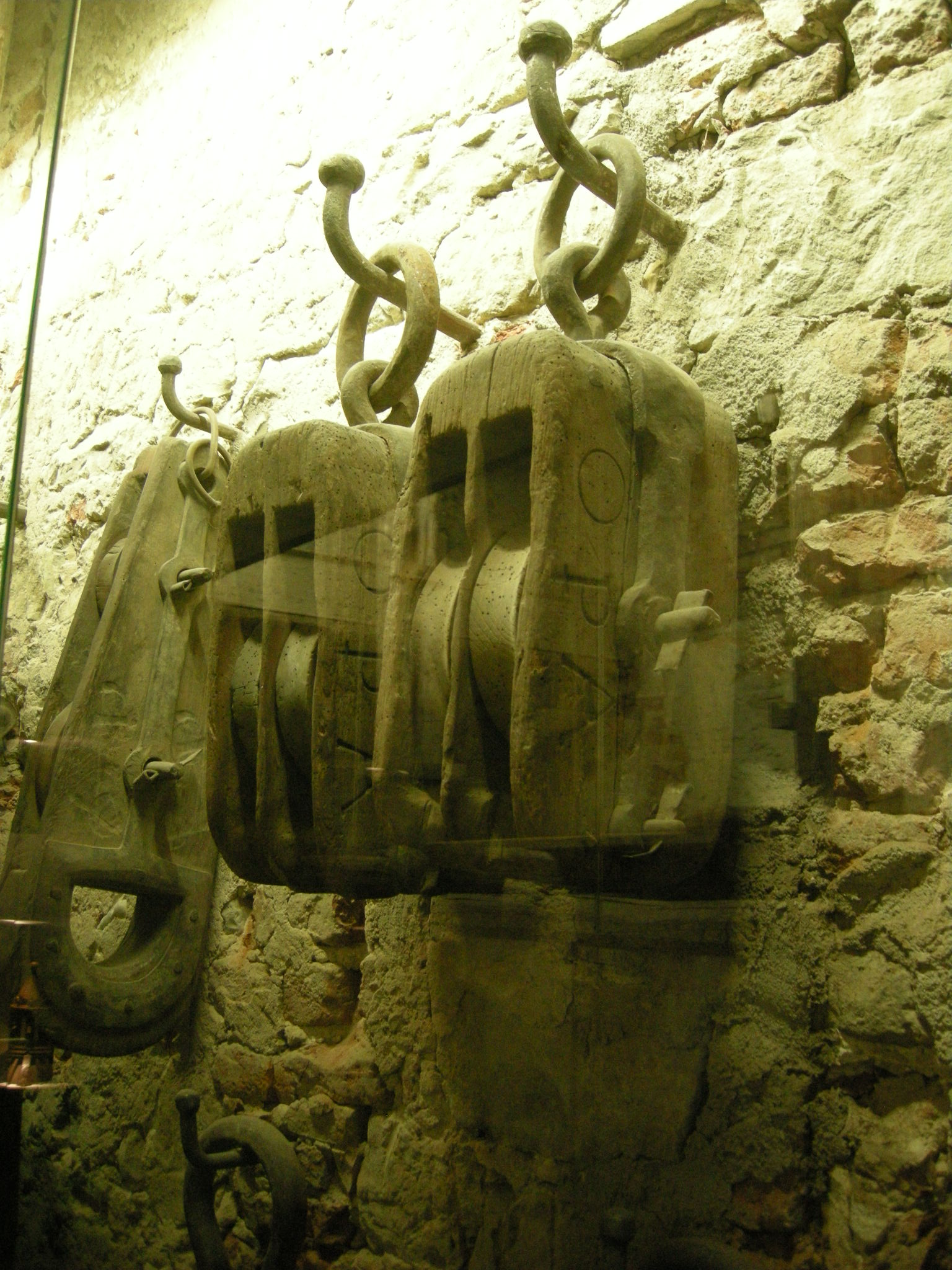 Argani e macchinari per la costruzione della cupola